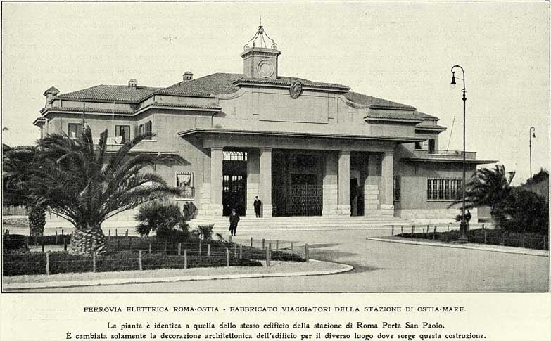 Stazione di Ostia-Mare (distrutta nel 1944)